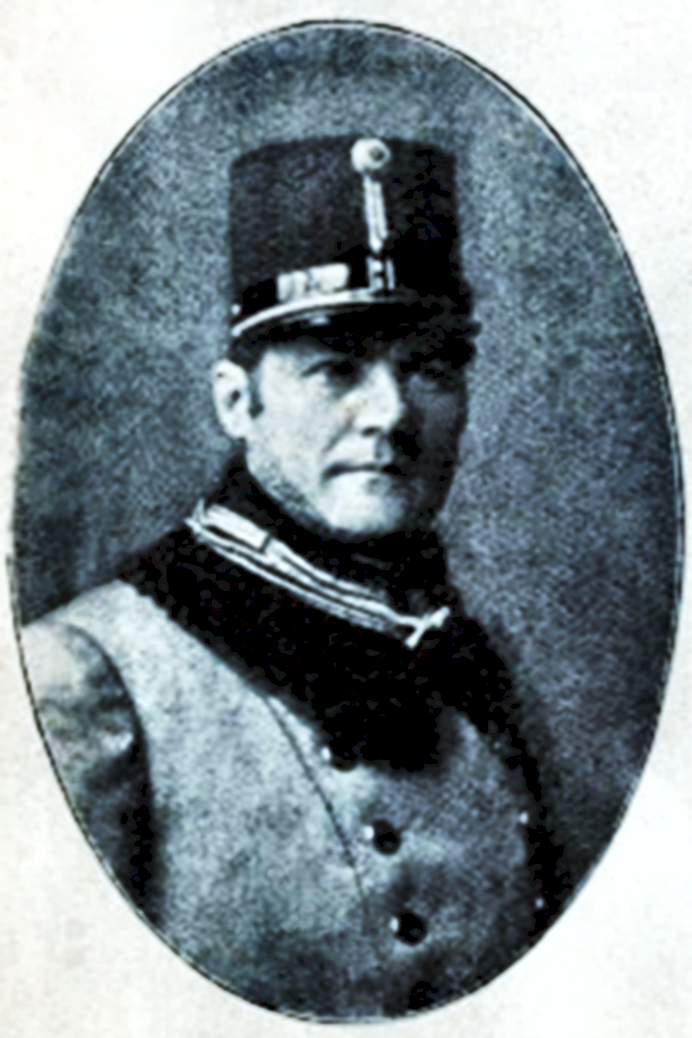 Rudolf Hans Bartsch, österreichischer Schriftsteller, als k. u. k. Hauptmann1914